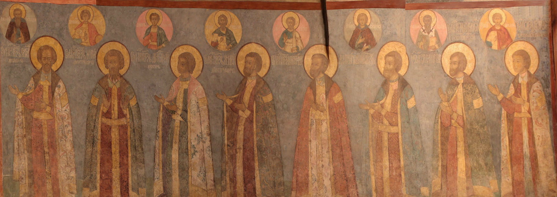 Frescos in Cathedral of the Archangel in Moscow Надгробные «портреты» князей, фреска на западной стене. Василий Юрьевич (Василий Юрьевич Косой) Георгий Димитриевич (Юрий II Дмитриевич Московский) Димитрий Георгиевич (Дмитрий Юрьевич Красный) Андрей Димитриевич (Андрей Дмитриевич Можайский) Петр Димитриевич (Петр Дмитриевич Дмитровский Иоанн Васильевич (княжич Иван Васильевич) Симеон Иоаннович Калужский (Семен Иванович Калужский) Георгий Васильевич Дмитровский (Юрий Васильевич Дмитровский)